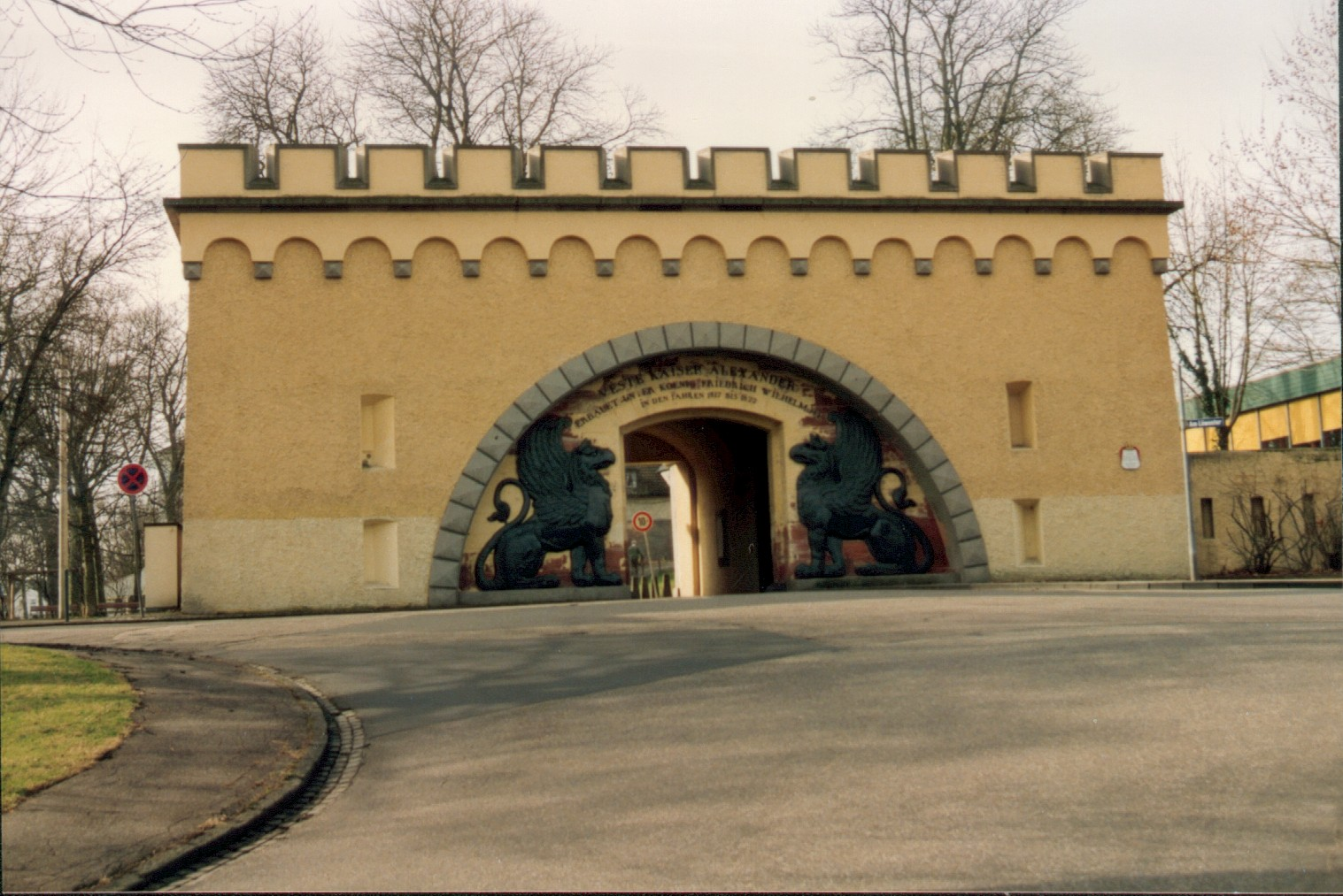 Vorderseite Löwentor (Haupteingang) der Feste Kaiser Alexander in Koblenz